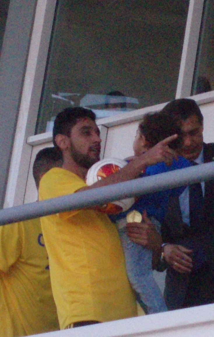 Карлуш Эдуарду де Фиори Мендеш